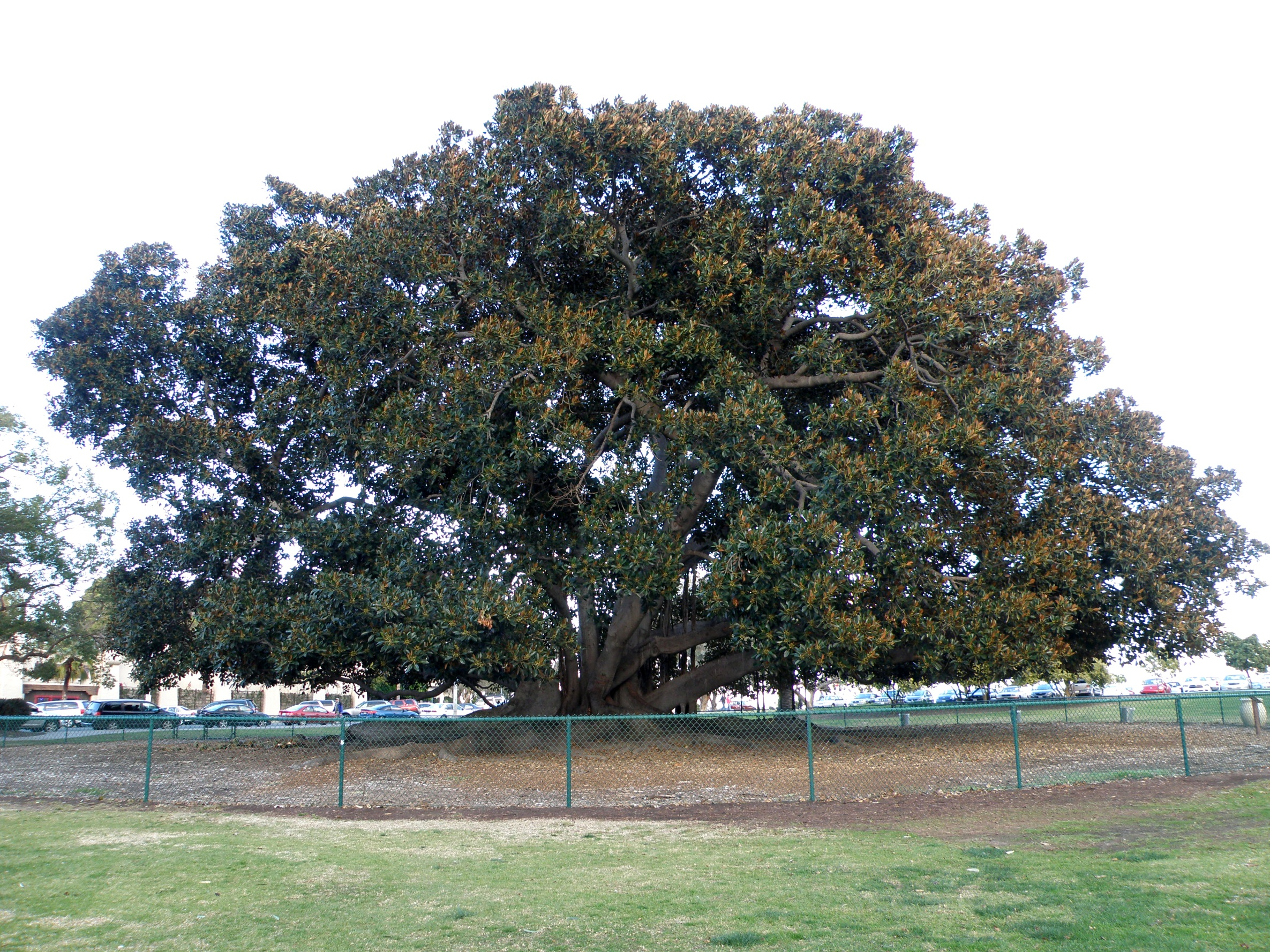 San Diego, CA USA - Balboa Park